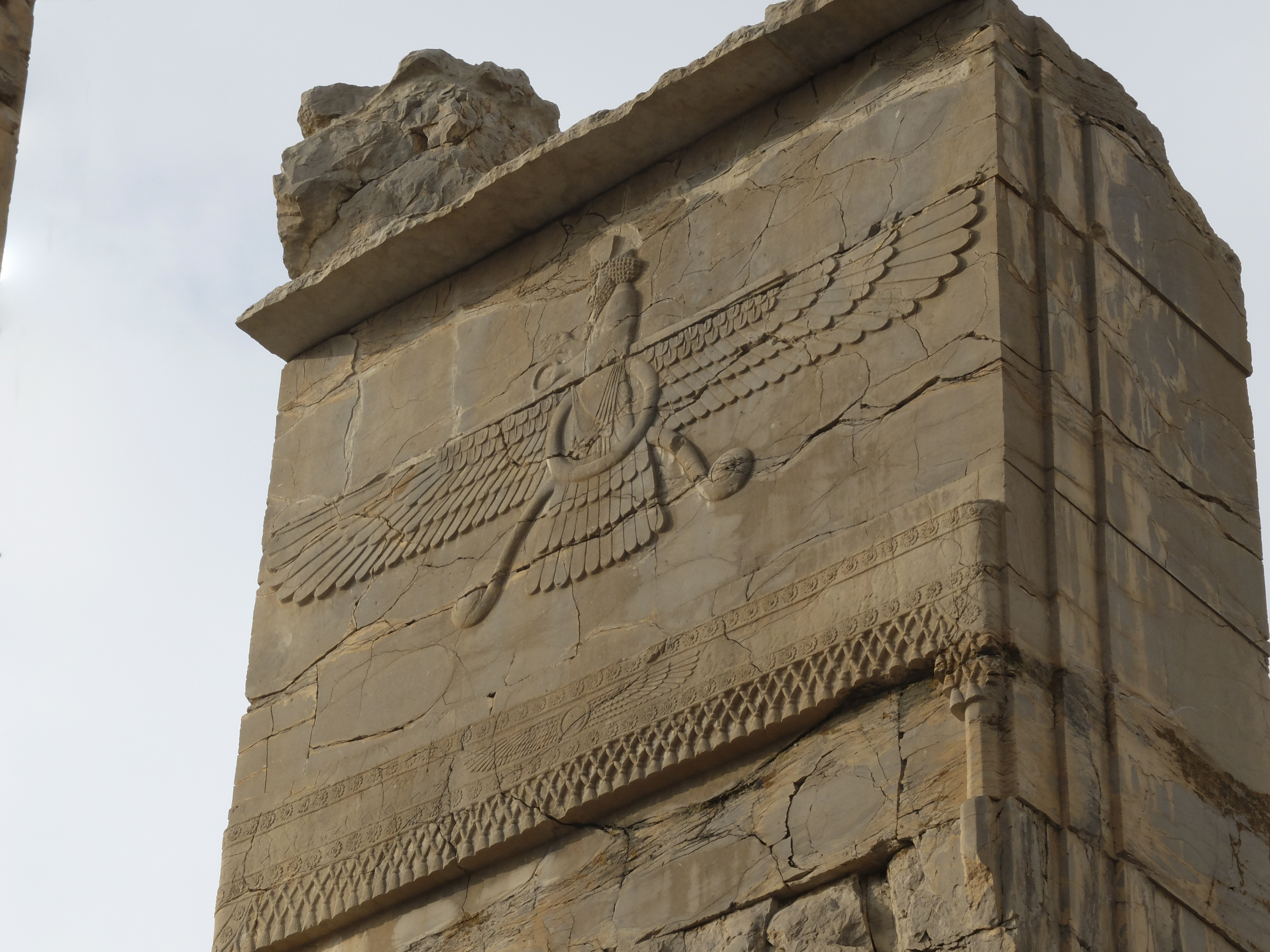 201312_iran_Shiraz_72